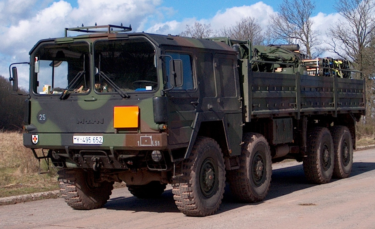 MAN 10to mil gl